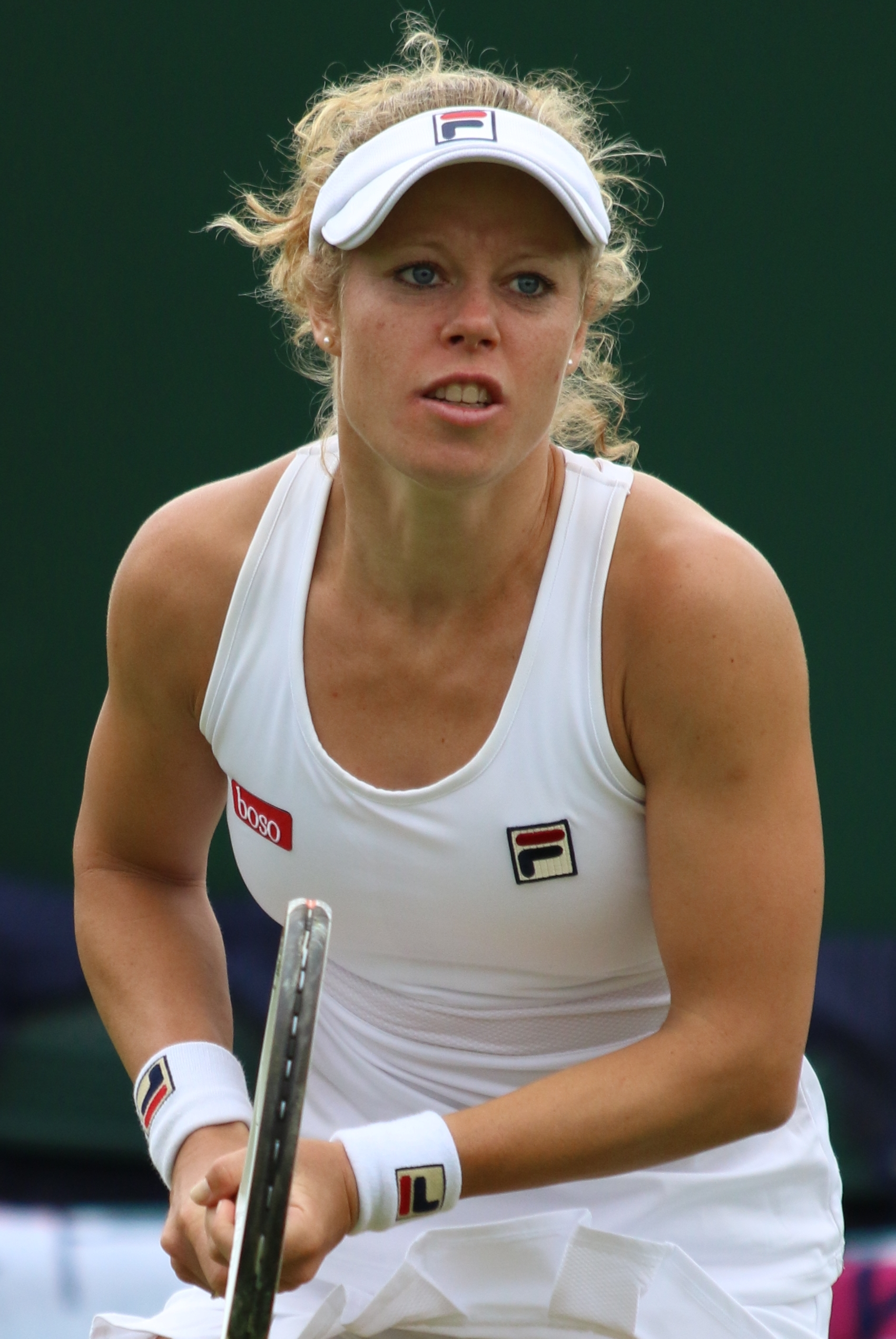 Siegemund WM19 (23)